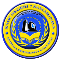 Logo SMKN 7 Samarinda